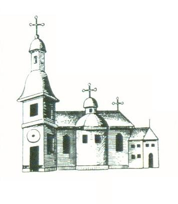 Беларуская (тарашкевіца): Слонім (Słonim), вуліца Бэрнардынская (vulica Bernardynskaja). Касьцёл Найсьвяцейшай Тройцы і кляштар бэрнардынаў